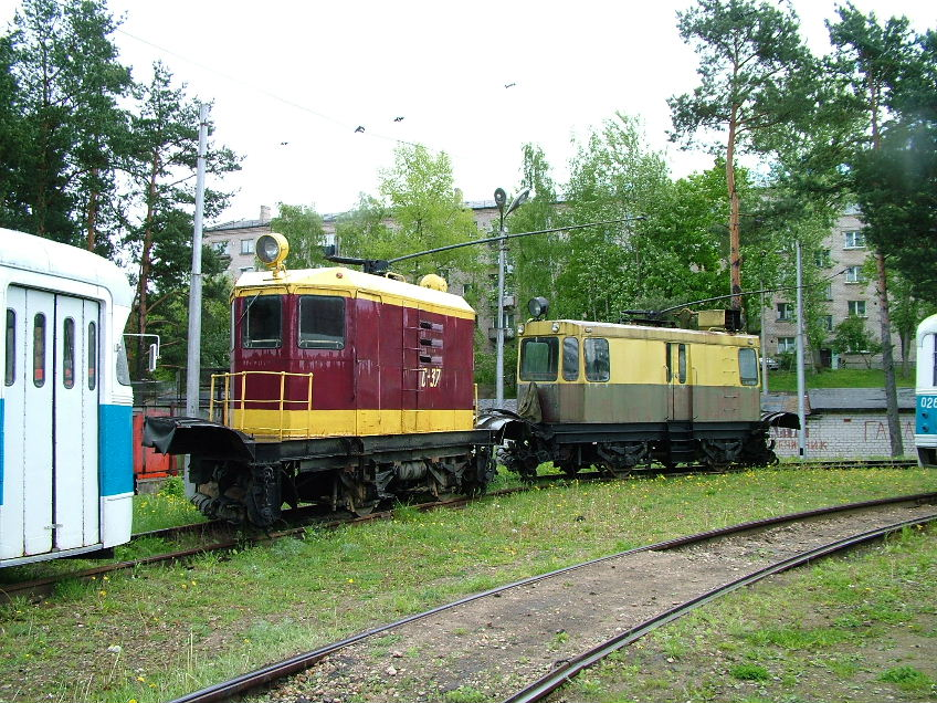 Два снегоуборщика в депо по ул.Ятнику /ранее Гагарина/